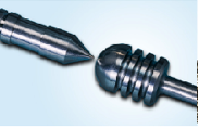 Wolframelektroden für Entladungslampen